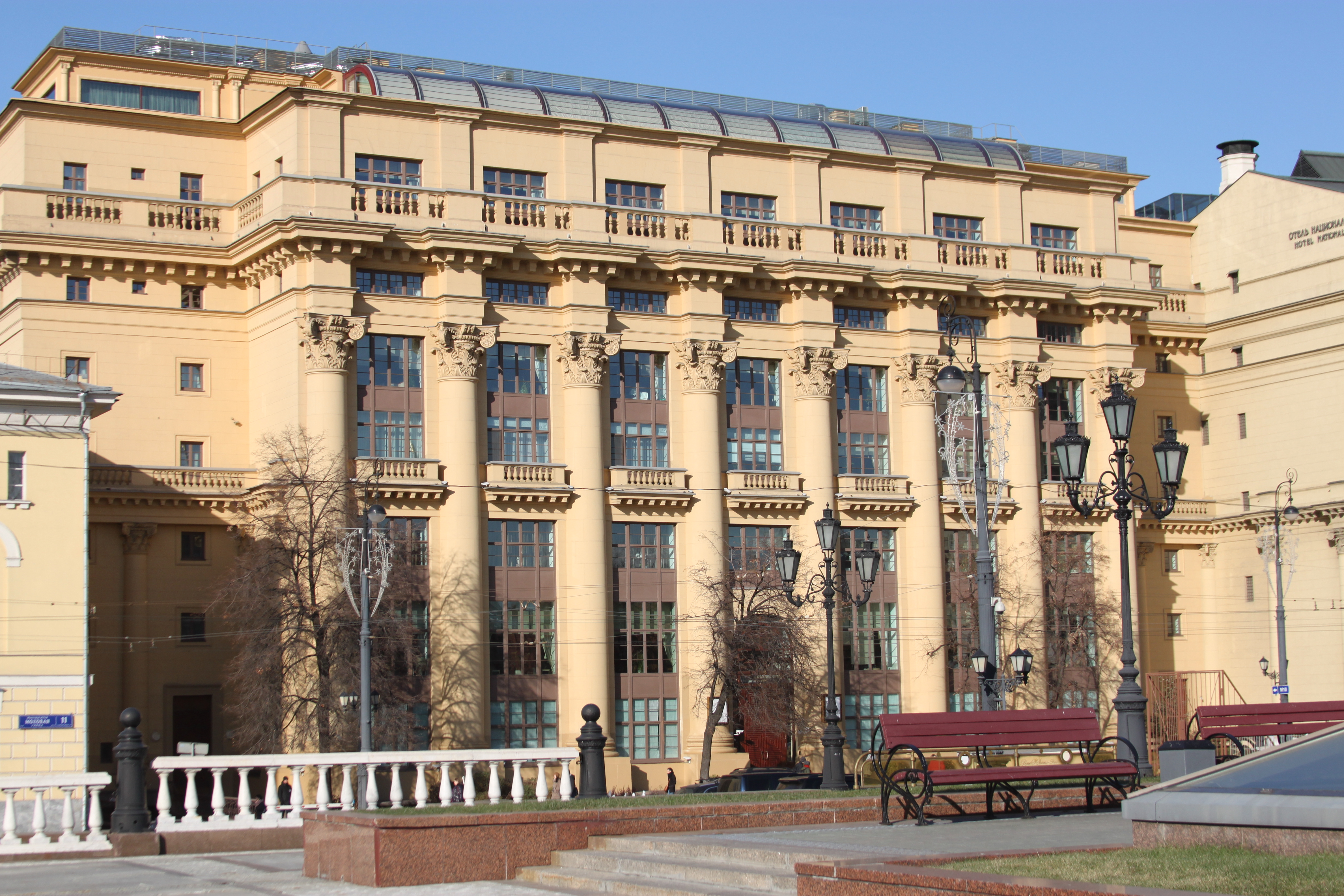 Москва, дом Жолтовского на Моховой 2014 Moscow Zholtovsky house on Mokhovaya street